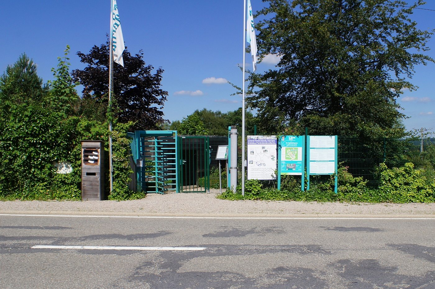 Botanischer Garten bei Elsenborn, Bütgenbach, Belgien, Herba Sana